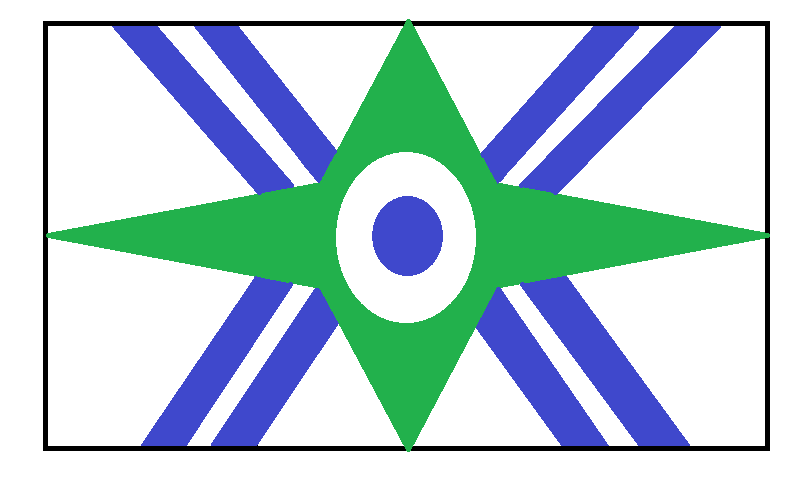 Bandeira de Nova Olinda - Tocantins